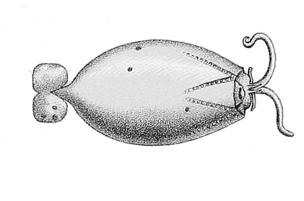 Liocranchia reinhardti